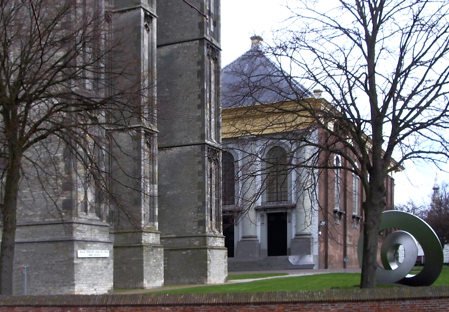 Turm St. Sievens und Nieuwe Kerk zu Zierikzee